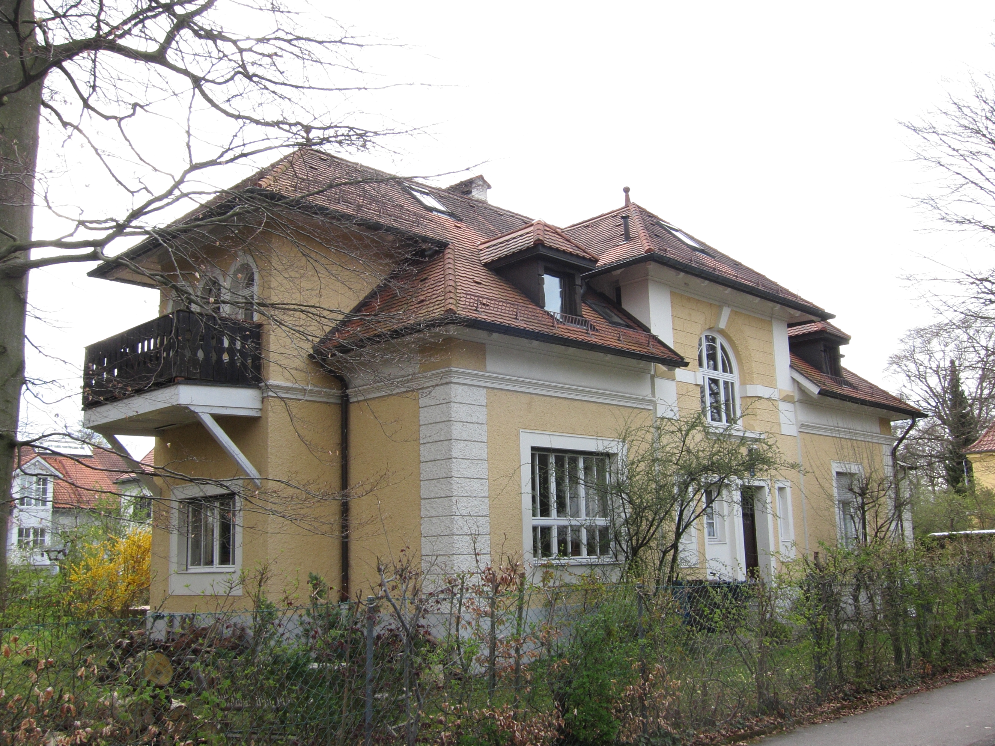 Wehnerstraße 11; Villa, schlichte Neurenaissance, 1899 von Louis Ende.